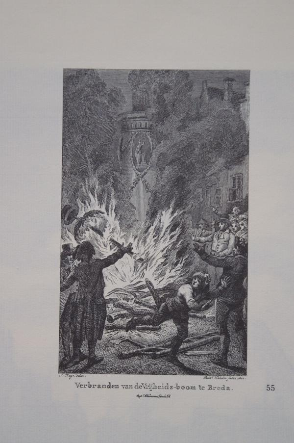 Kopergravure: Het verbranden van de vrijheidsboom te Breda. Vermoedelijk betreft het hier een gebeurtenis die plaatsvond in 1793.